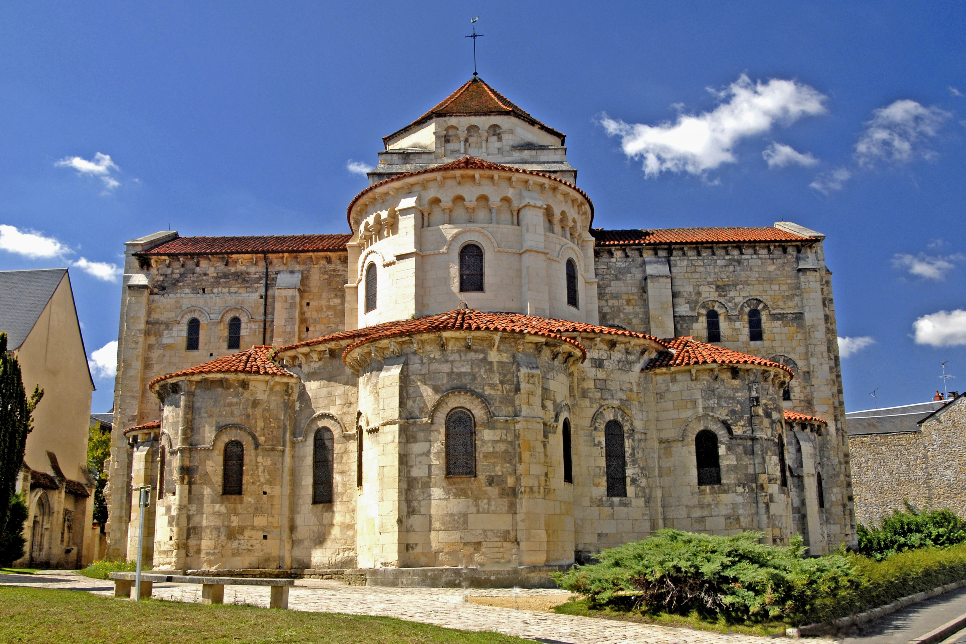 Saint-Etienne Nevers, Chorhaupt